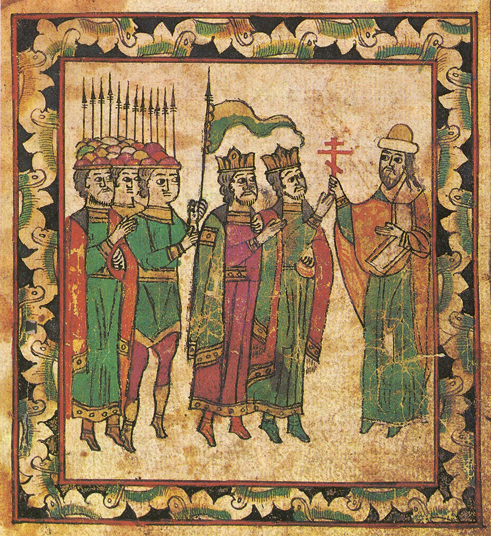 Сказание о Мамаевом побоище. Лицевая рукопись XVII века из собрания Государственного Исторического музея в Москве. В Коломне, месте сбора всего русского войска, епископ коломенский благословляет князей и войско на битву. Миниатюра. Бумага, темпера. 12,7Х11,7 (без полей) Дата фото: 1980 г. Издательство: "Аврора", Ленинград. Размер листа и изображения: 228х168. Архив ЦАКа.